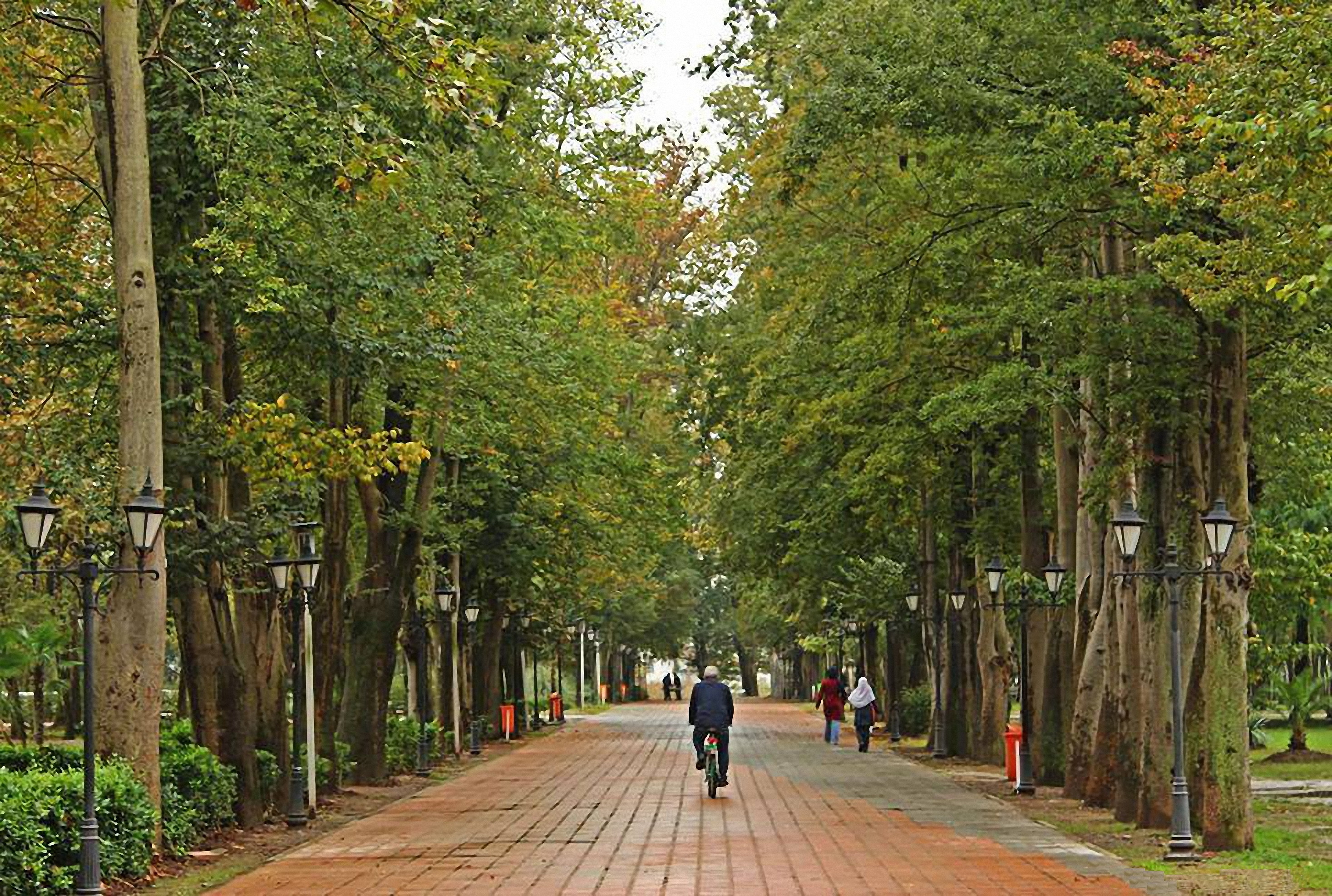 باغ مهتشم رشت